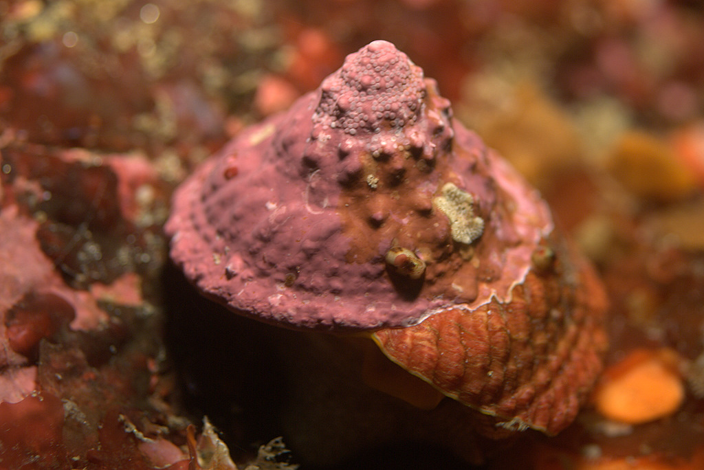 Pomaulax gibberosus (Dillwyn, 1817) (synonym: Lithopoma gibberosa)